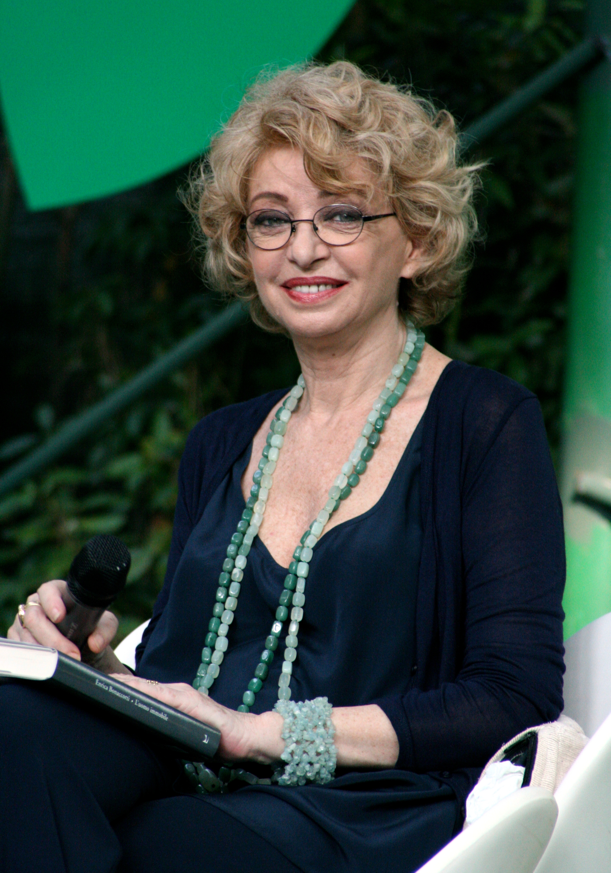 Enrica Bonaccorti